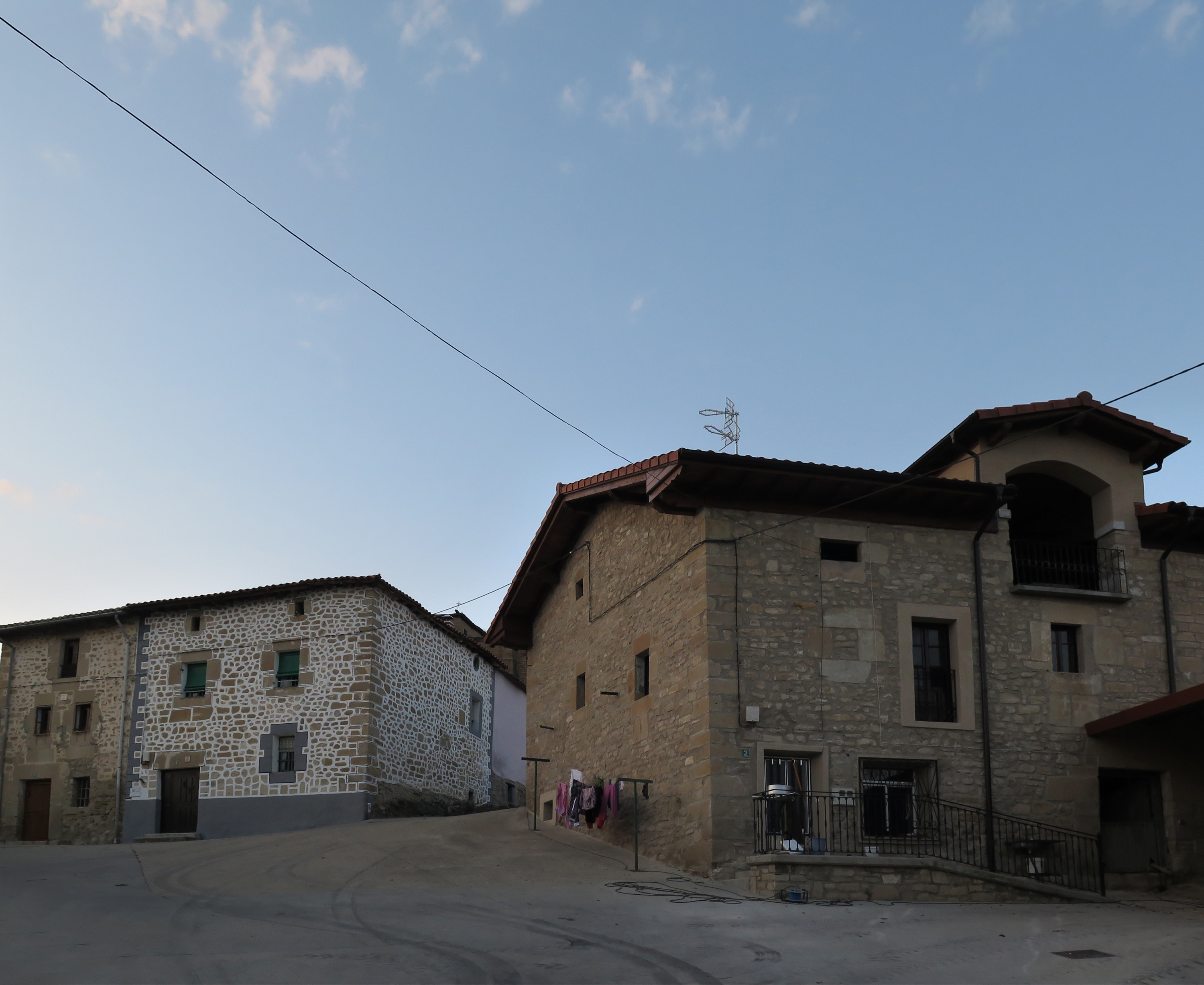 Calle del pueblo de Caicedo de Yuso, en la provincia de Álava (País Vasco, España)